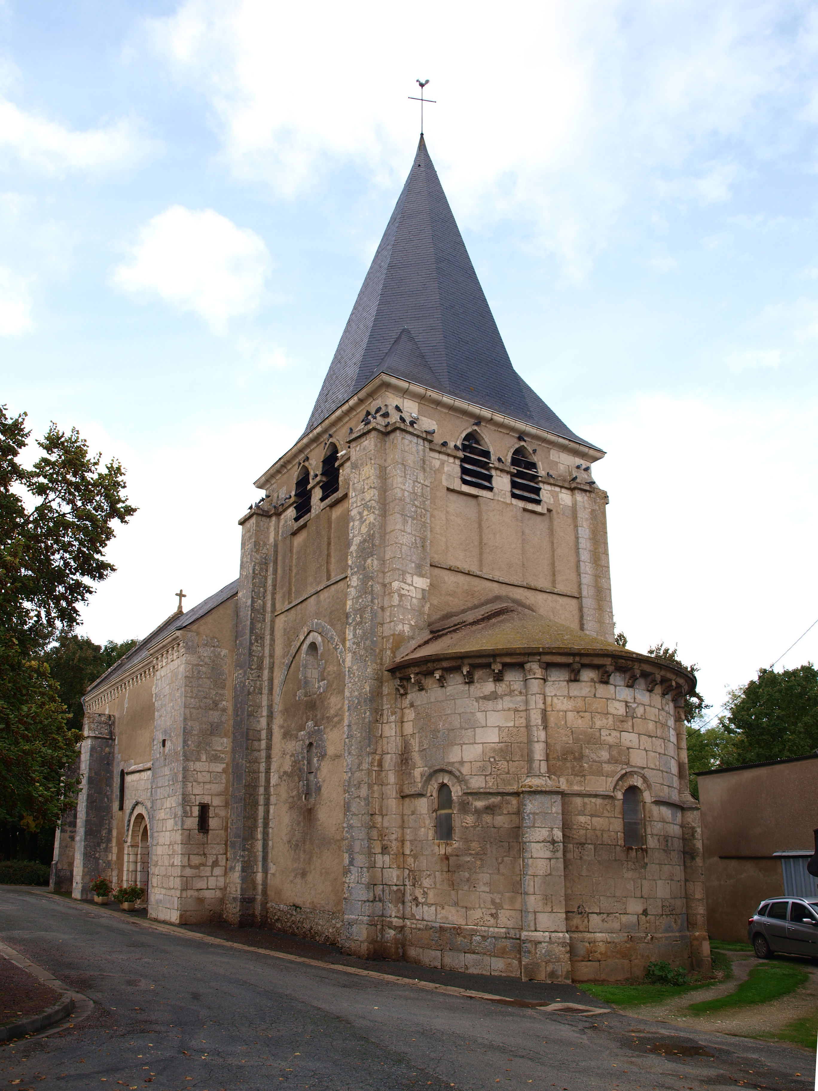 La Champenoise (Indre, France) ; église